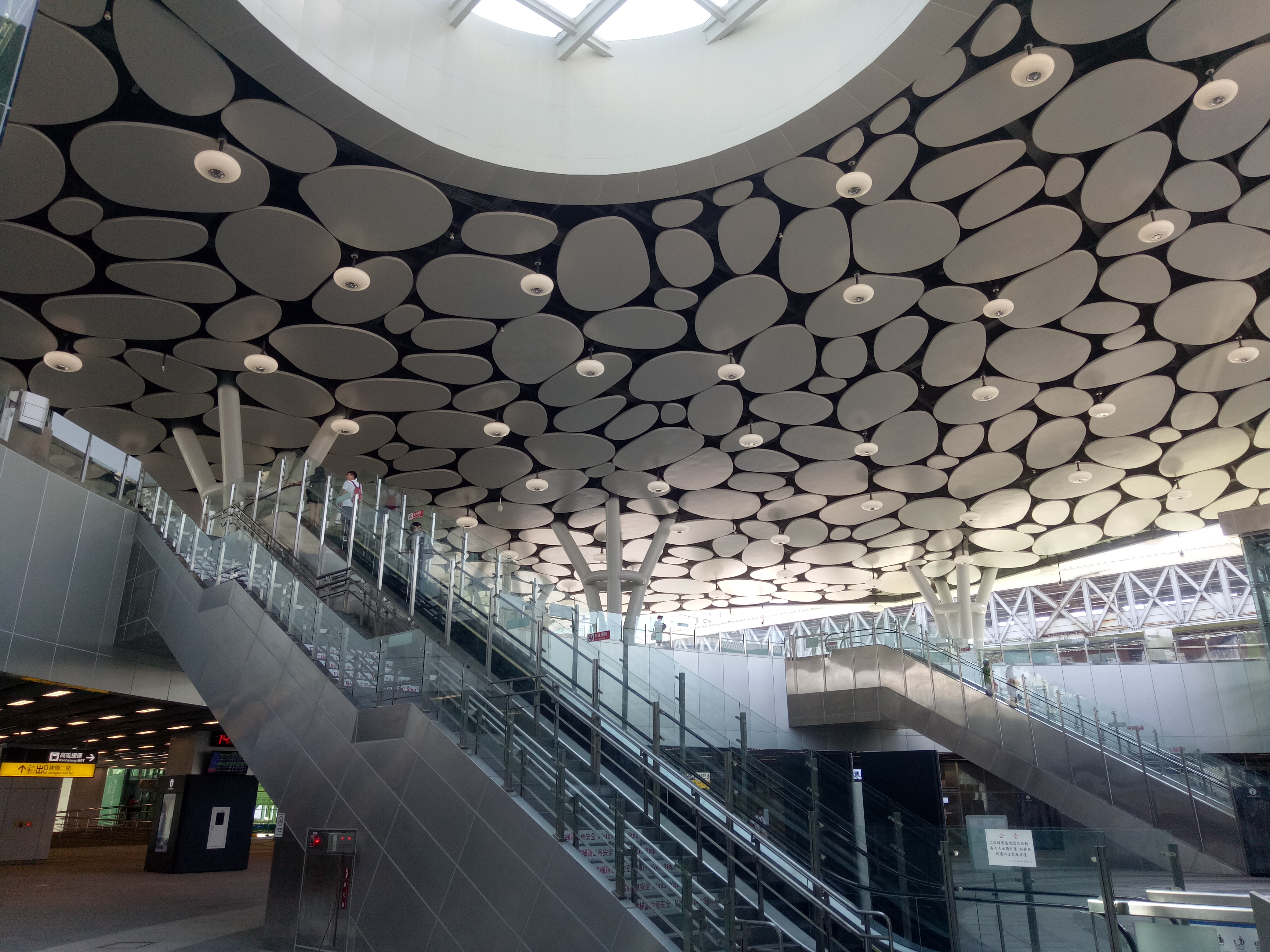 臺灣鐵路管理局高雄車站新站入口處。